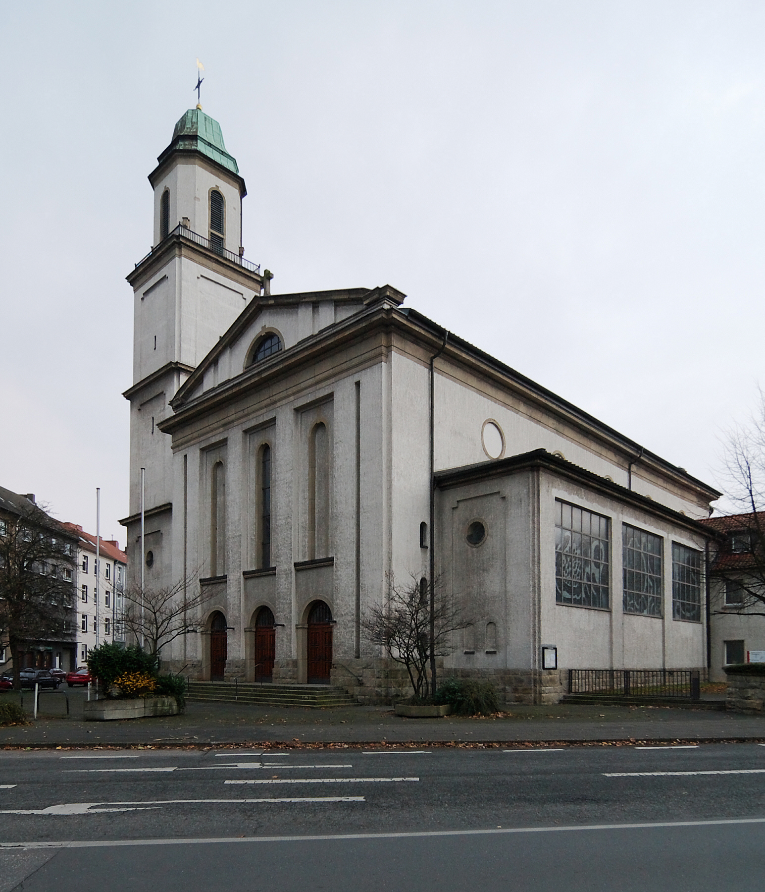 Katholische Kirche St. Gertrudis in Dortmund (Fredenbaum), Nordrhein-Westfalen, Deutschland.